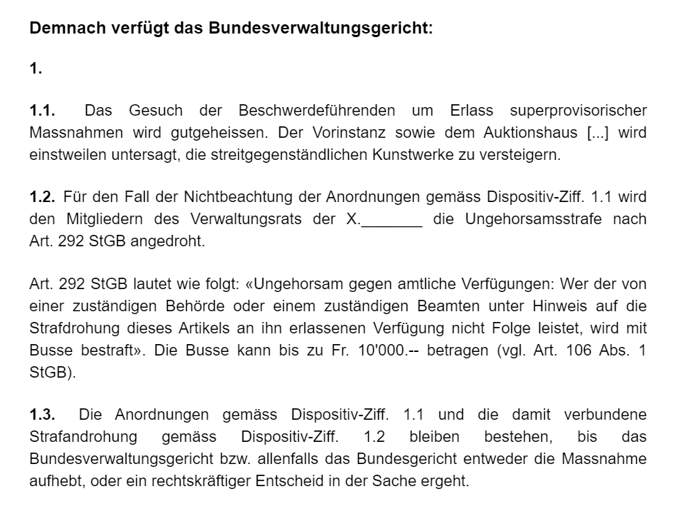 Zwischenverfügung vom 4. Dezember 2019 (superprovisorische Anordnung in Sachen Scharzenbach et al. gegen Oberzolldirektion)